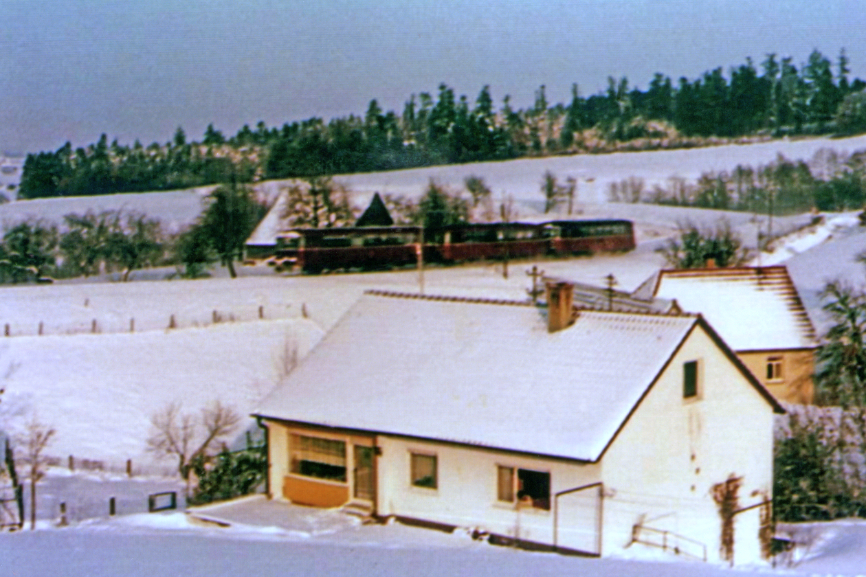 Ehemalige Hohenstaufenbahn bei Metlangen bei Schwäbisch Gmünd.